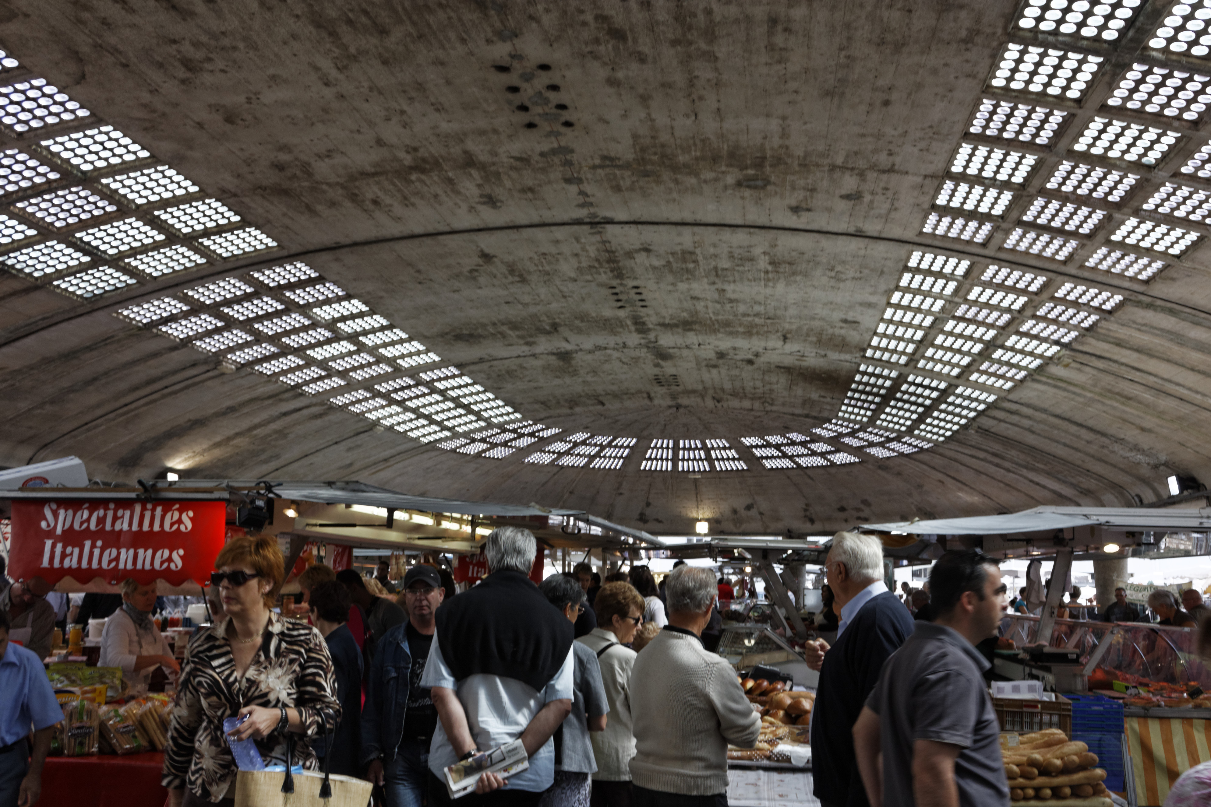 Former market place, work of œuvre de Nicolas Esquillan (1902-1989).